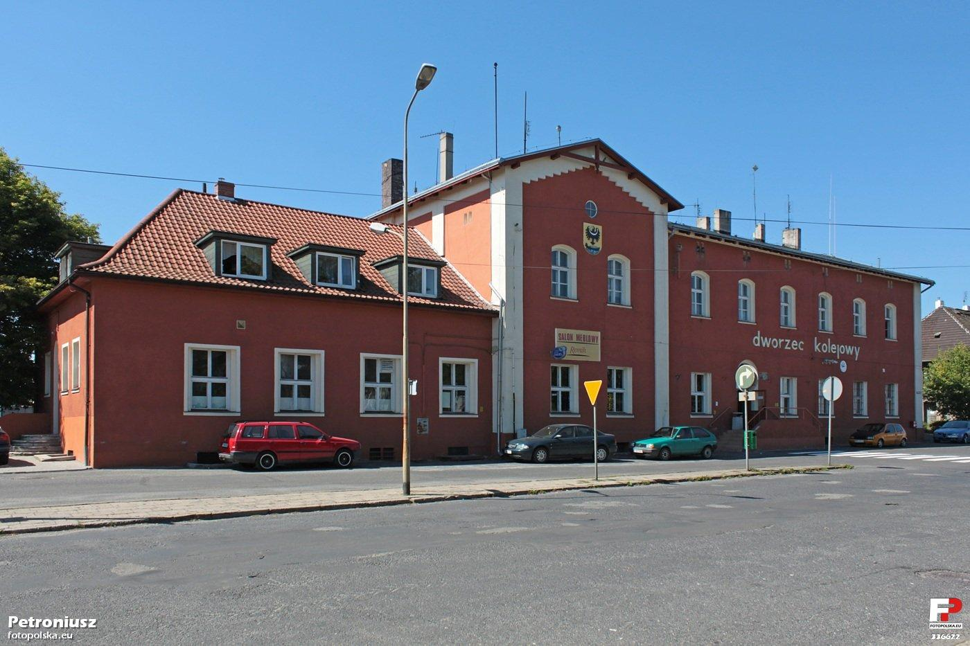 Dworzec na stacji kolejowej PKP Nowa Sól.